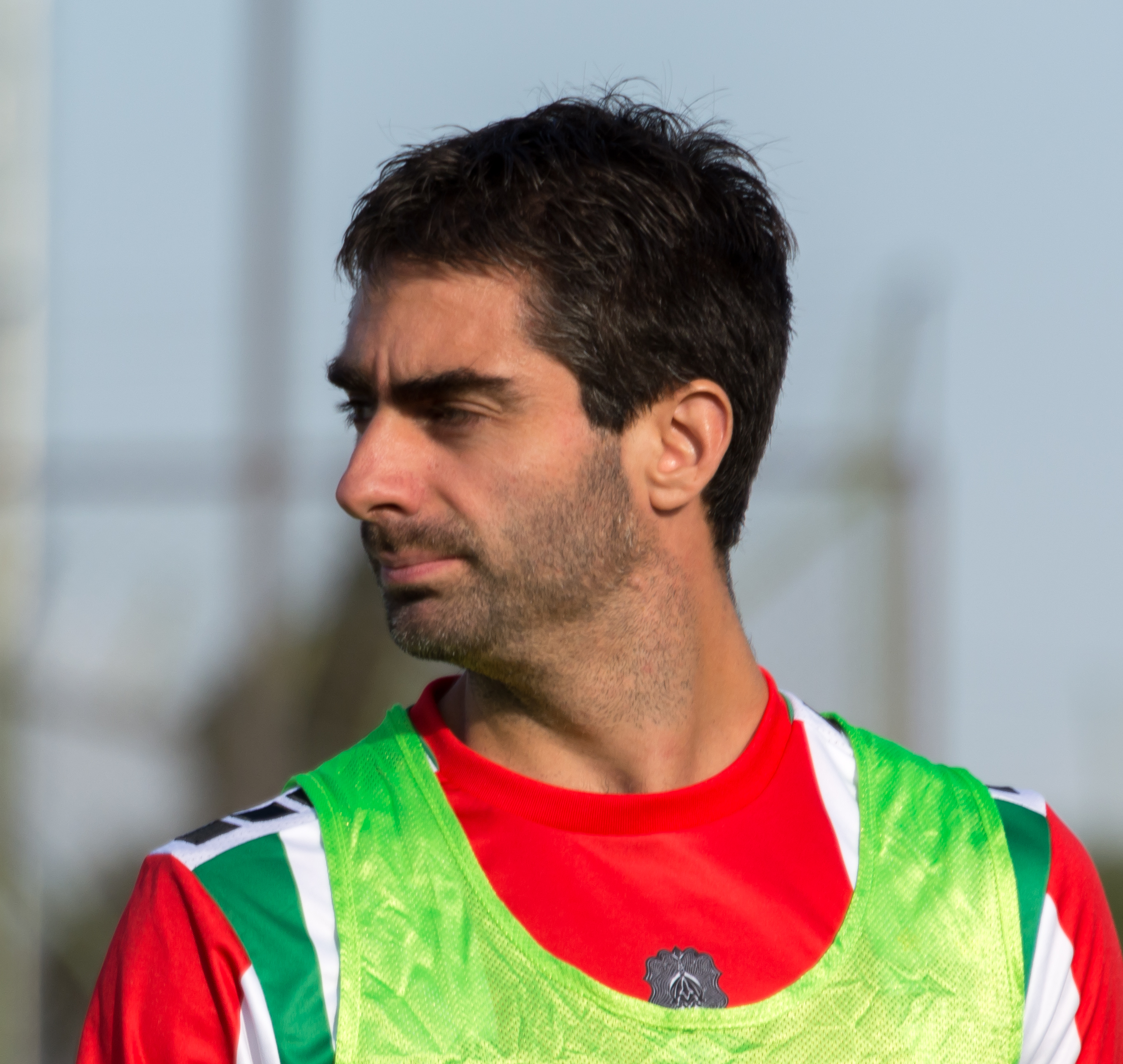 Diego Rosende, Palestino v Universidad de Concepción, Estadio Municipal de La Cisterna, La Cisterna, Santiago, Región Metropolitana, Chile.